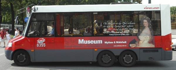 Kleinbus der Wiener Linien von VW, Wien